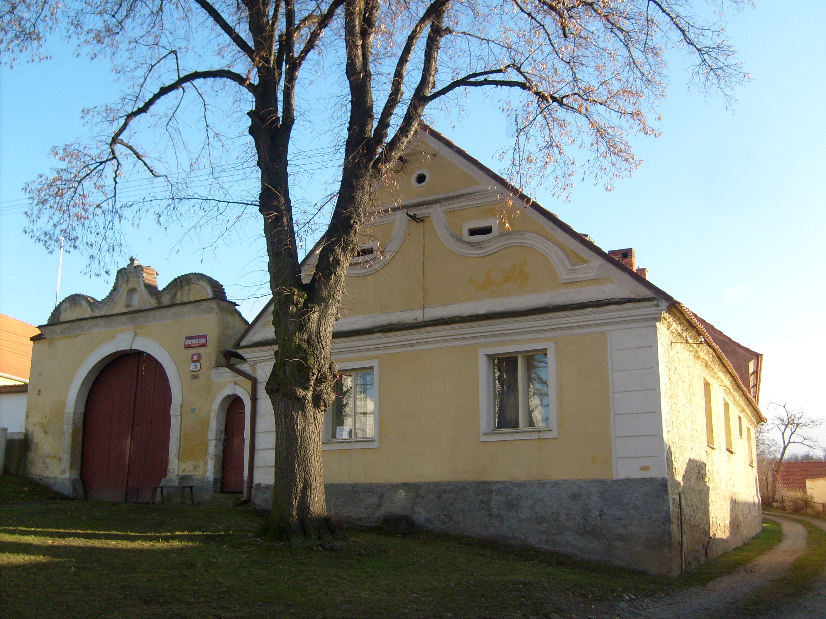 Koterov